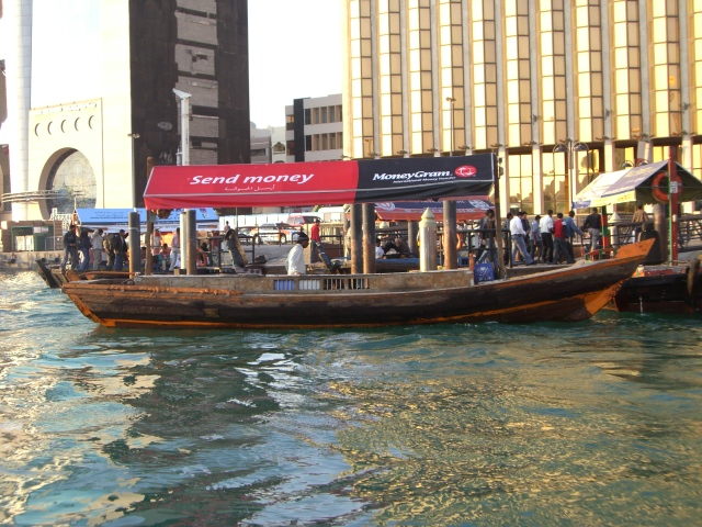 Dubai